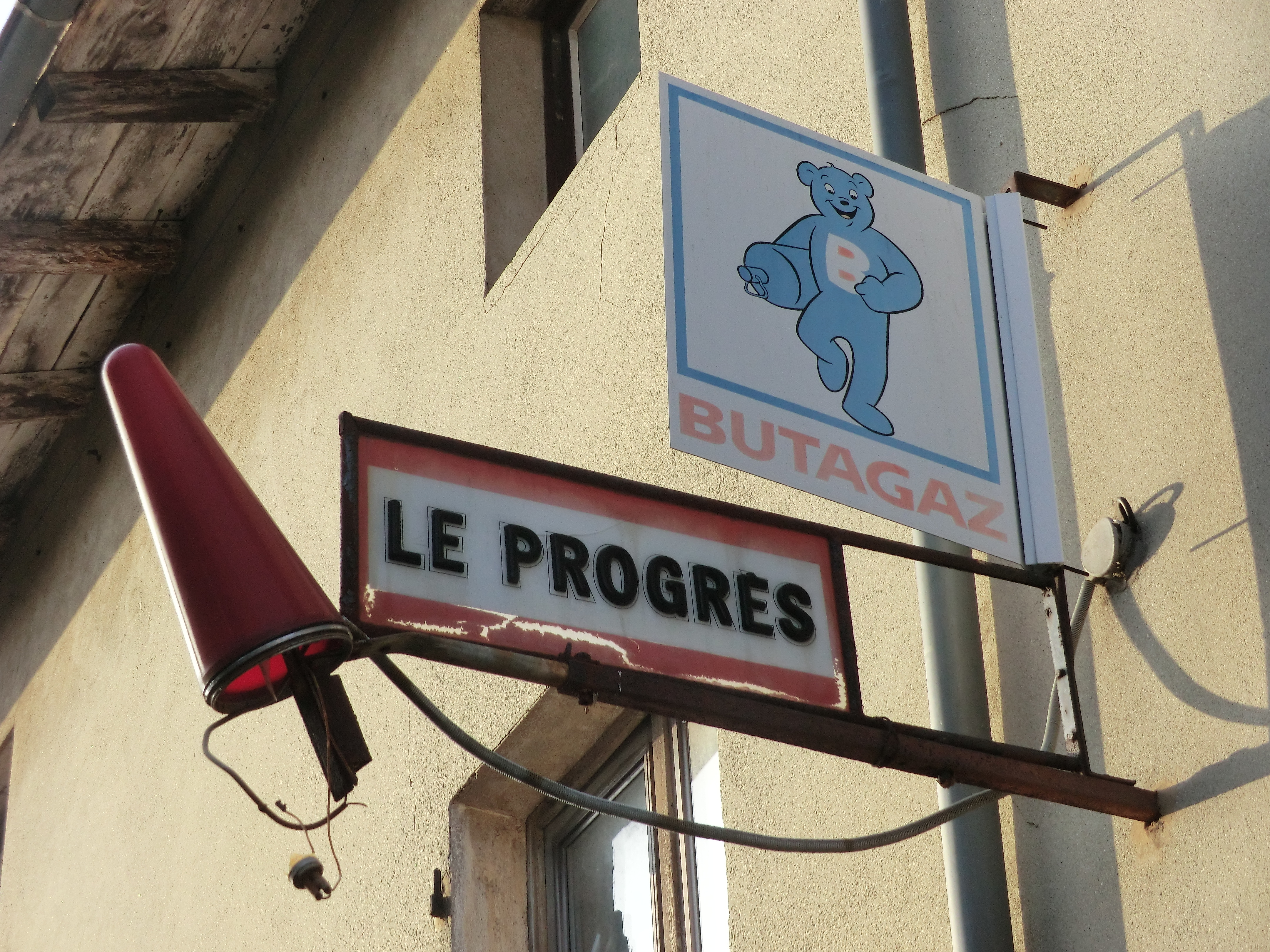 Signal tabac - Butagaz - Le Progrès.